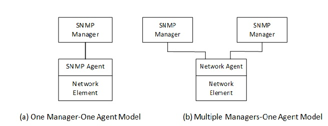 Монгол: 2 түвшинт загвар